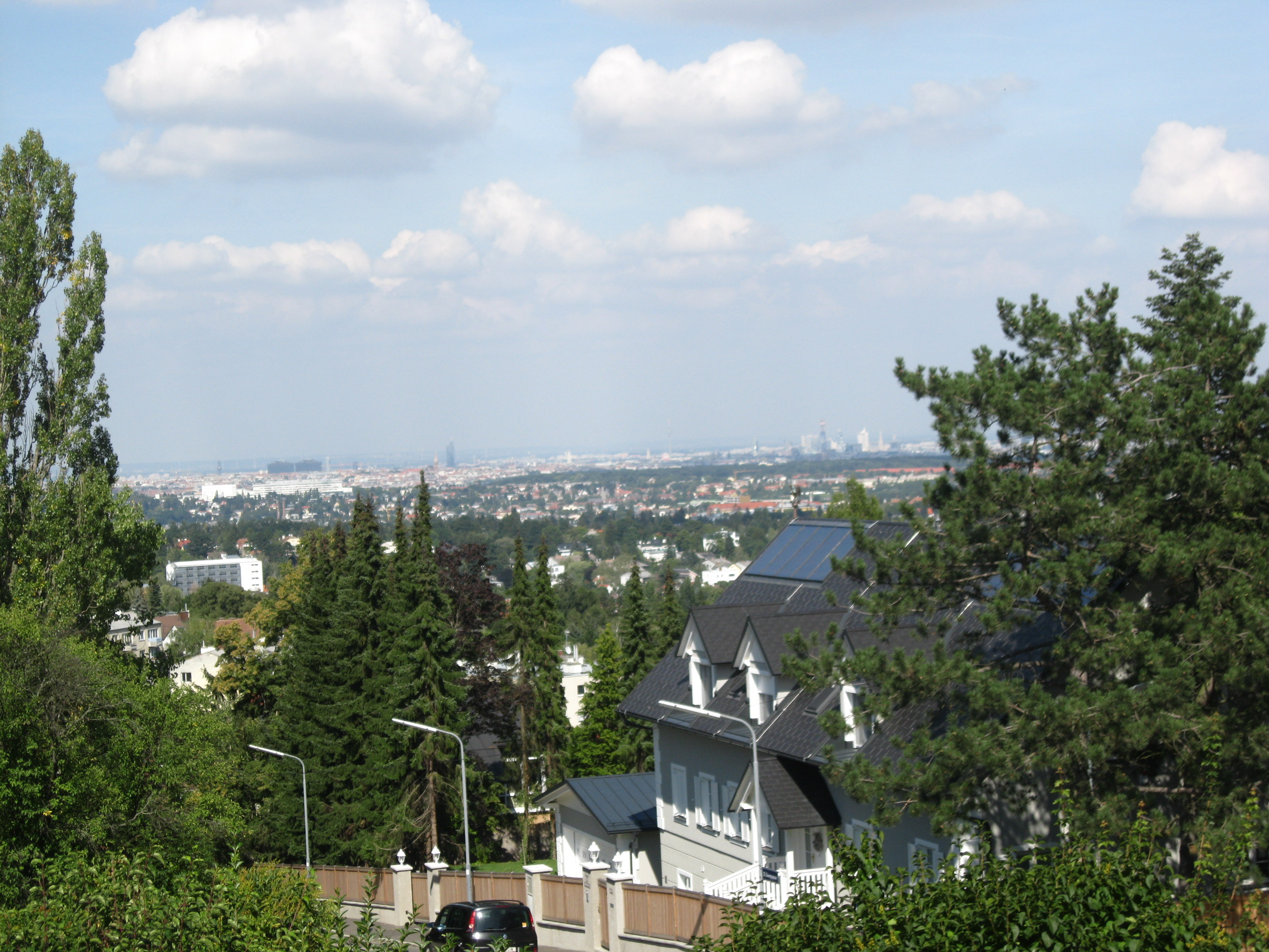 Pohled na město Vídeň